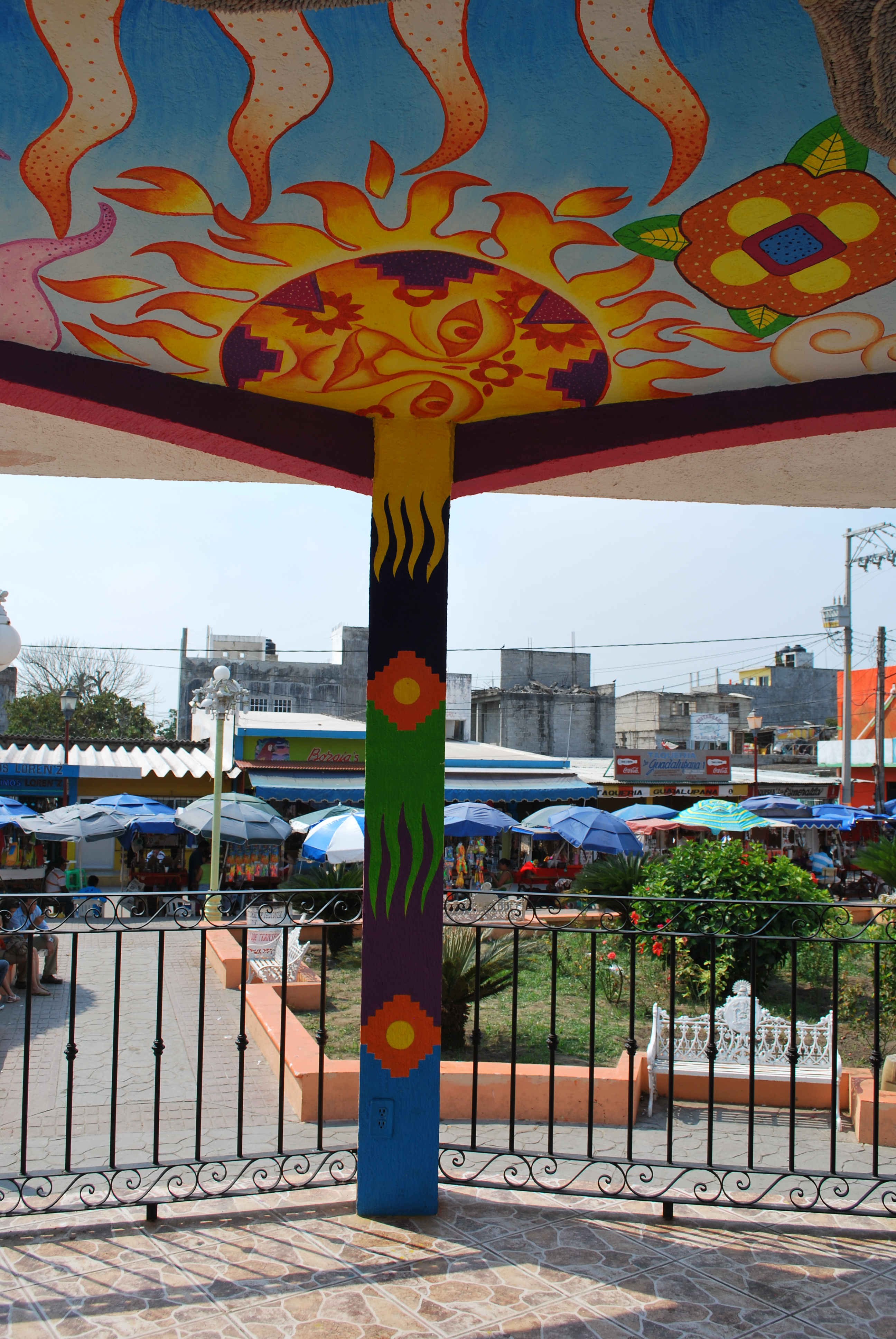 Kiosk in the main square of Tecolutla, Veracruz